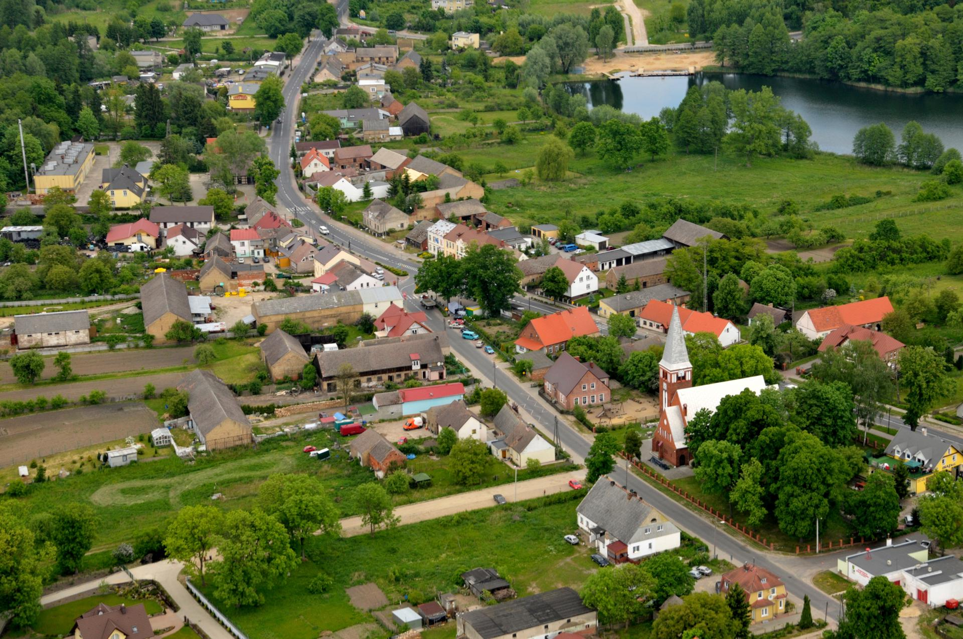 Centrum wsi Kłodawa